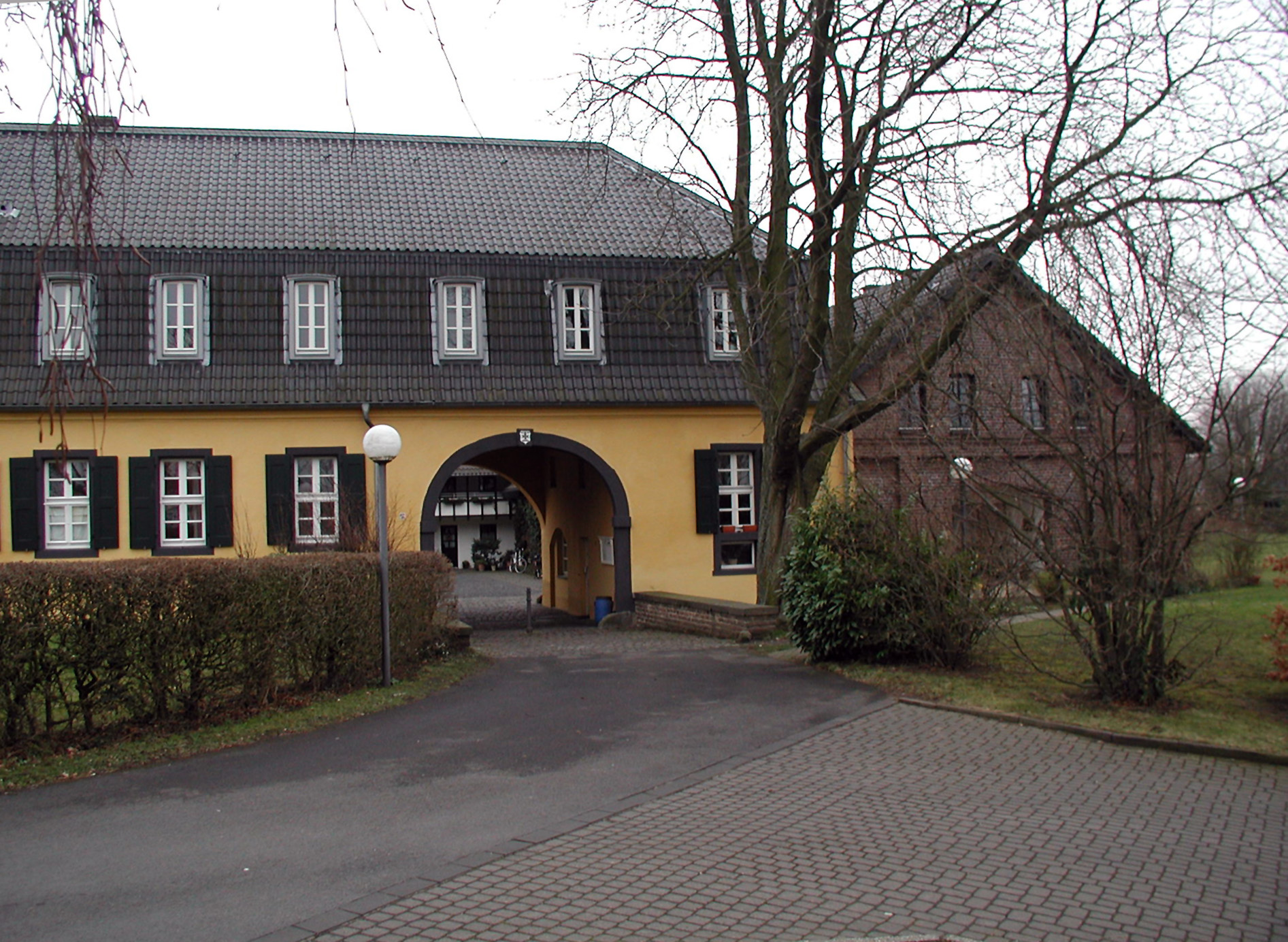 Palmersdorfer Hof, Brühl. Herrenhaus, Eingang Innenhof